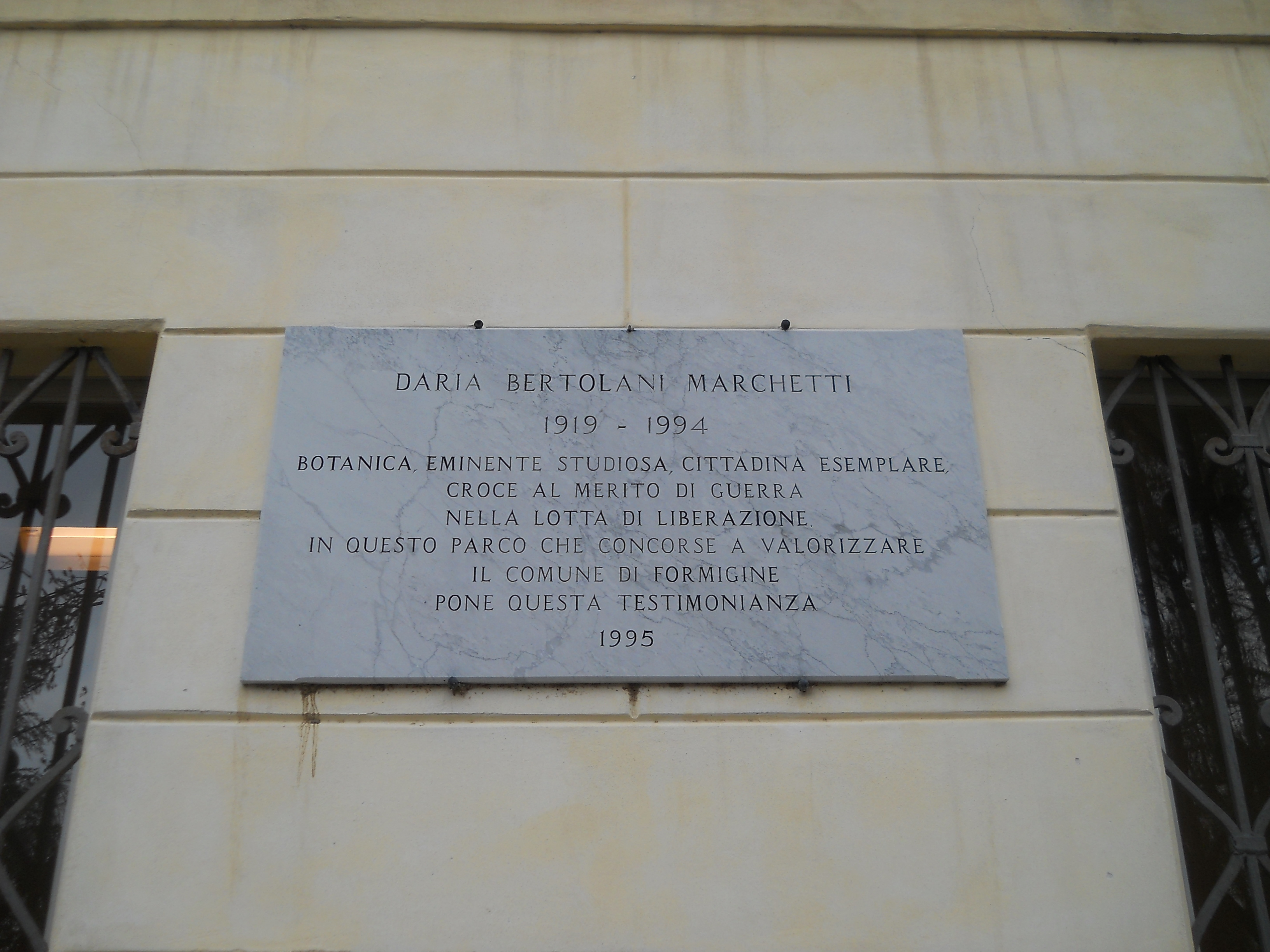 Targa sulla facciata di Villa Gandini a Formigine